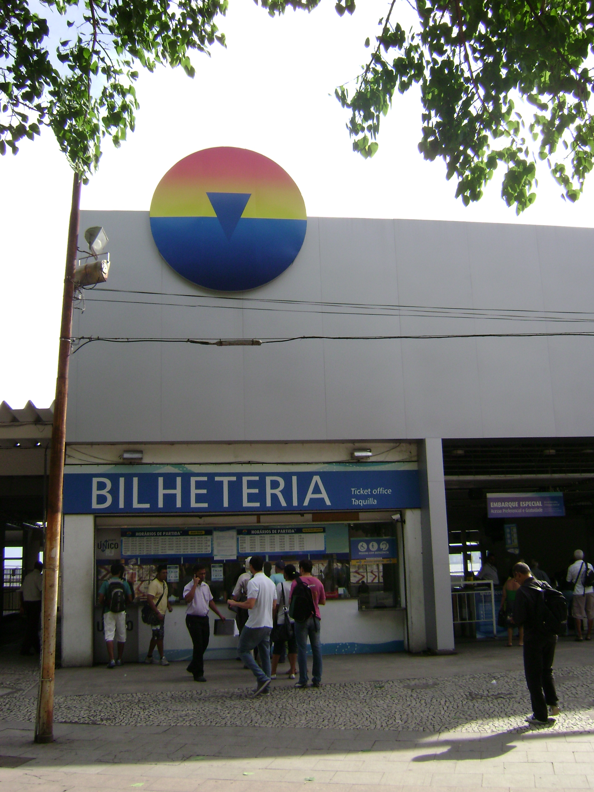 Bilheteria da Barcas S/A no centro da cidade do Rio de Janeiro, Brasil.